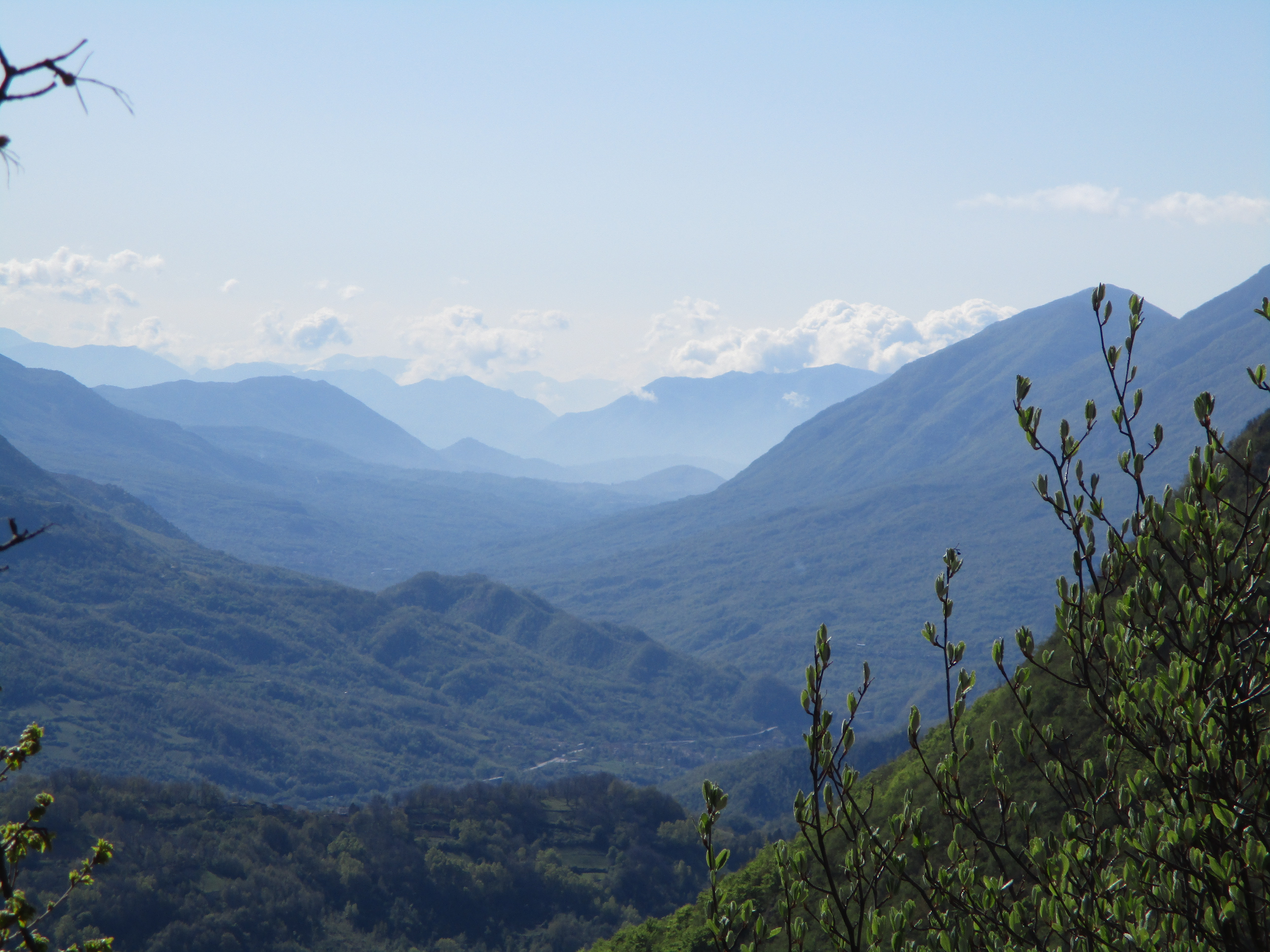 Veduta della valle Roveto